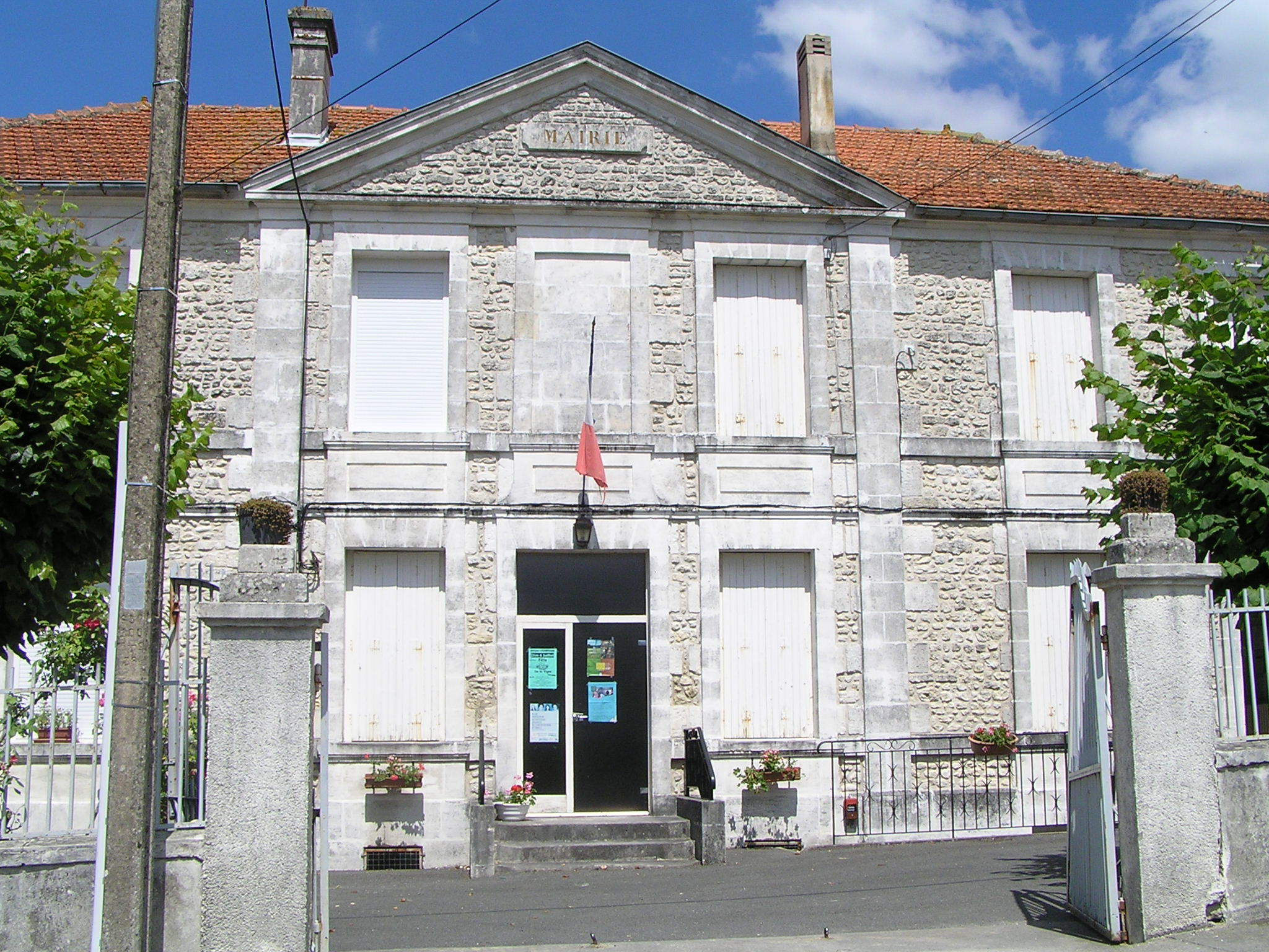 mairie de Saint-Preuil